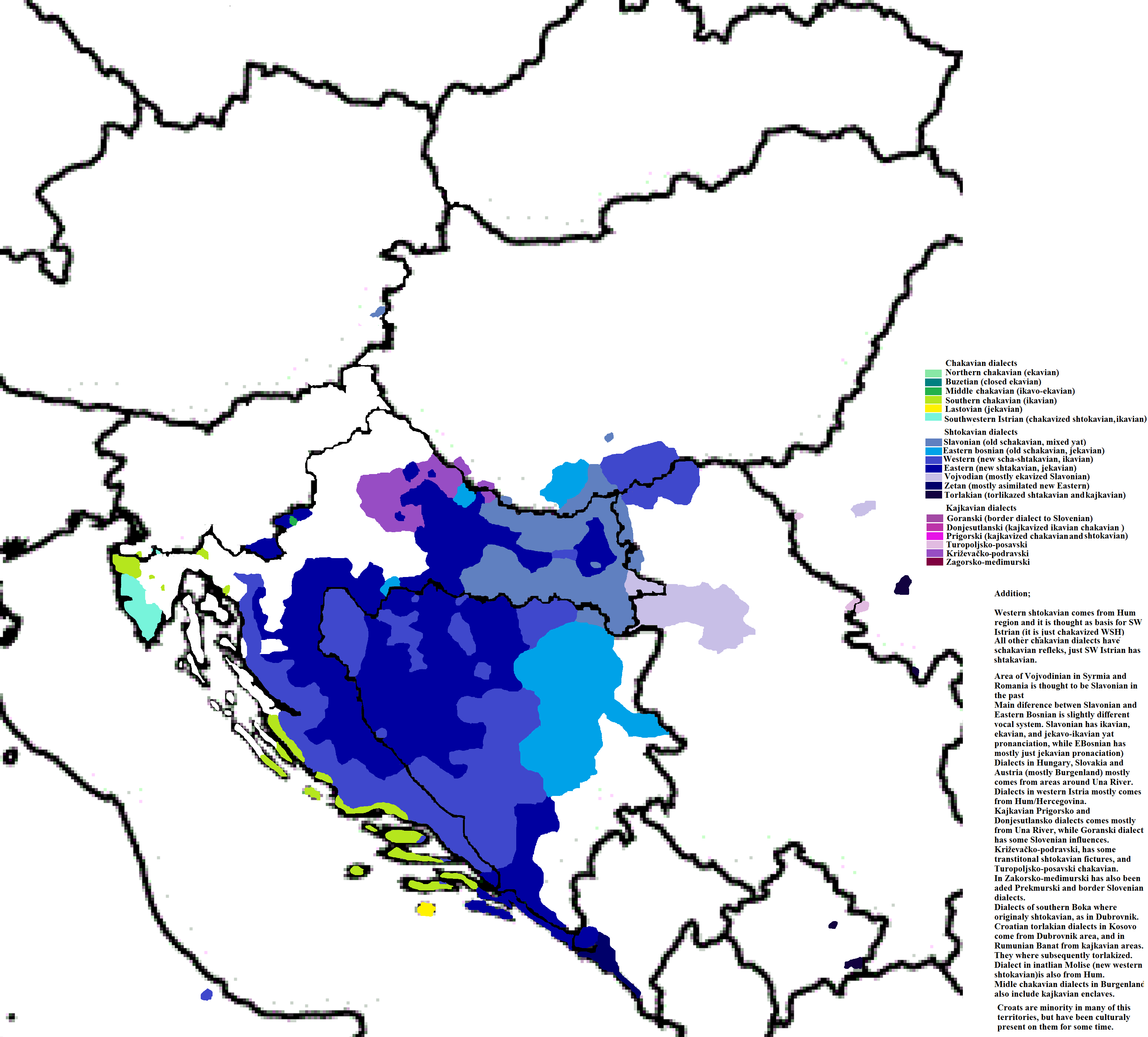 Štokavski hrvatski dijalekti i povezani; 4 glavna; zapadni, južni, slavonski i istočnobosanski južnodalmatinski, lastovski i jugozapadni istarski (3 ikavska čakavska) istočni kajkavski (križevačko-podravski) i asimilirani dijalekti (zetski u Boki, torlački na Kosovu, Srbiji i Rumunjskoj, te ekavizirani šokački u Srbiji i Rumunjskoj)